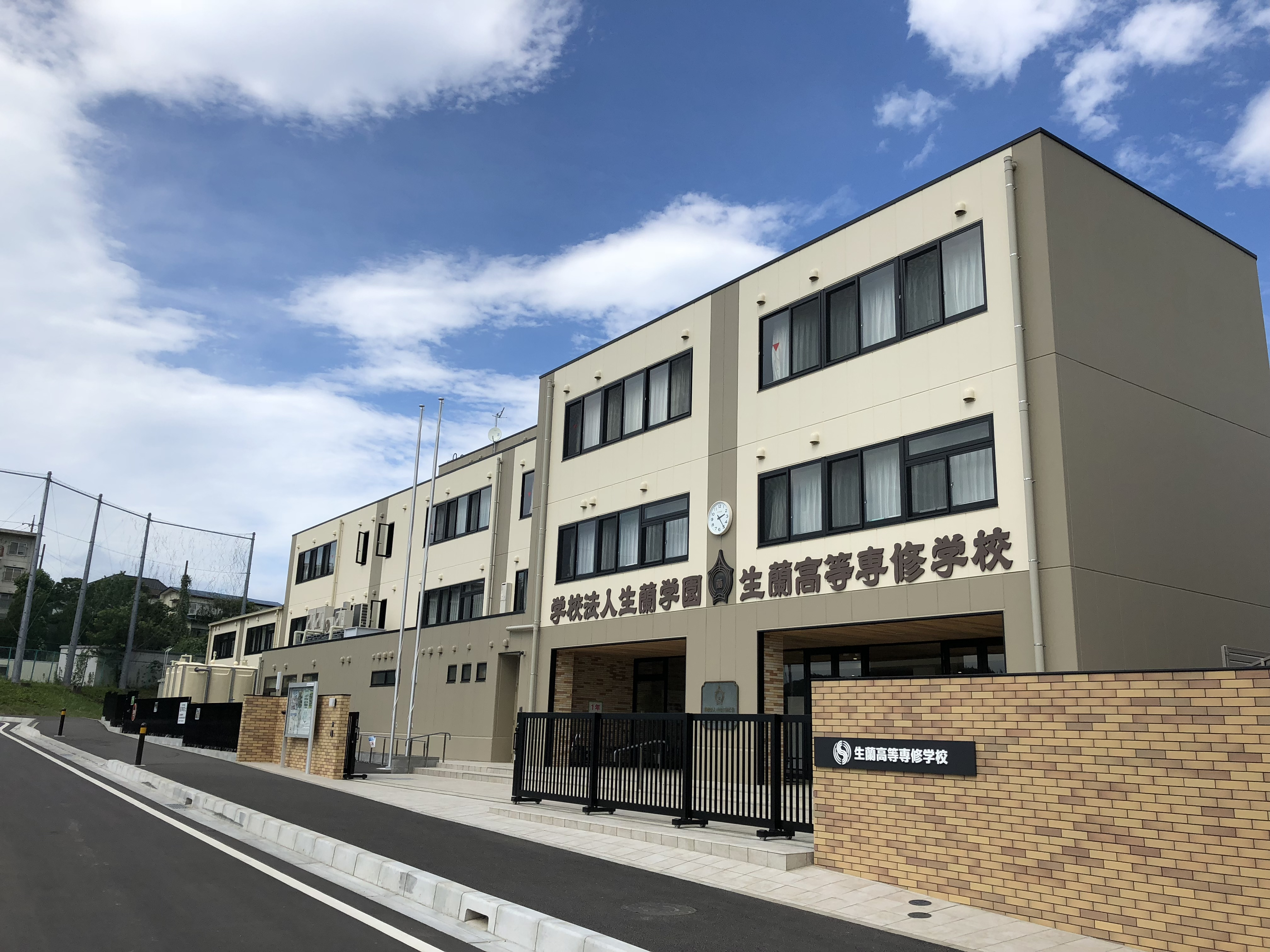 生蘭高等専修学校の新校舎